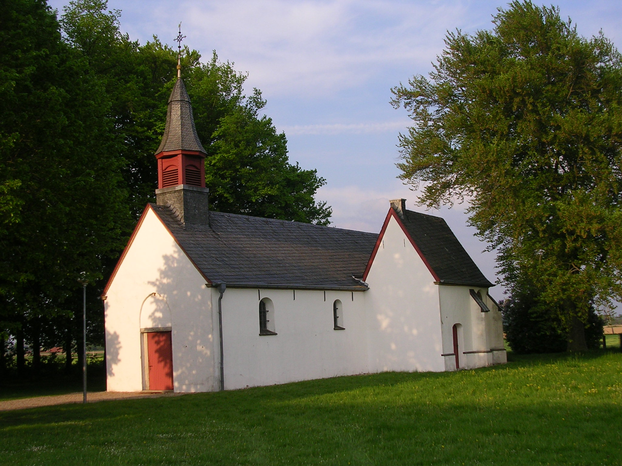 St. Peter, die erste Kirche im Kempener Land